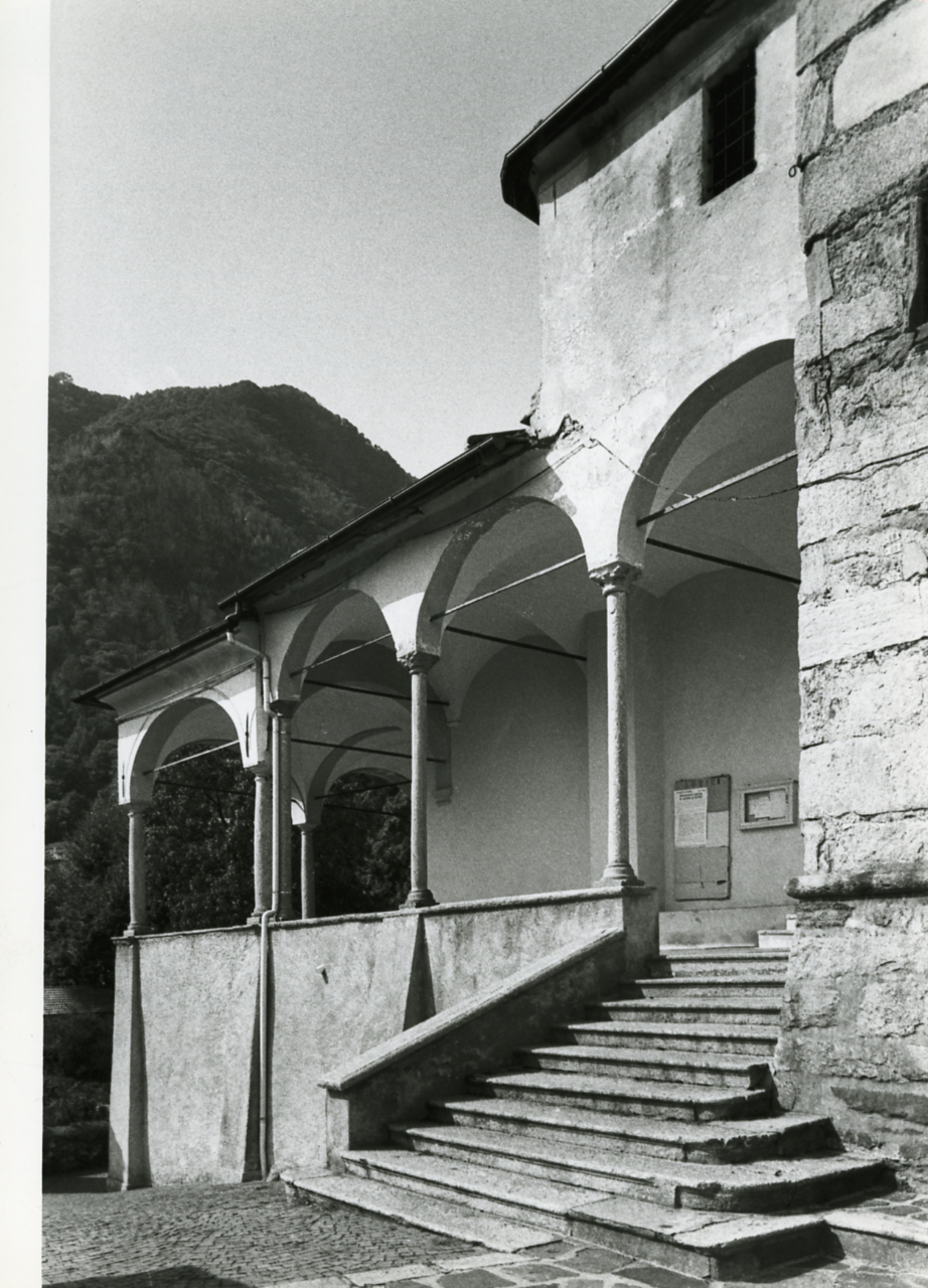 Servizio fotografico : Cesara, 1980 / Paolo Monti. - Stampe: 5 : Positivo b/n, gelatina bromuro d'argento/ carta, 24x30. - ((Al verso delle stampe manoscritti i numeri dei negativi (e dei fogli di provini dei negativi) corrispondenti secondo altra numerazione (riportata anche nei fogli dattiloscritti conservati nella scatola "Lago d'Orta", numerata 44): A8, [A?]14/19, A26/19, A48/22, e secondo altra numerazione: 43/10; timbro a inchiostro con copyright: "© Copyright/ Credit to/ Paolo Monti/ Corso Sempione [...]/ Milano". - Sul coperchio della scatola iscrizione didascalica manoscritta a pennarello nero: "Lago d'Orta". - Per identificazione soggetti e datazione, vedi fogli pinzati dattiloscritti con indicazioni di luogo e data di ripresa del lavoro sul Lago d'Orta, all'interno della scatola n. 44, "Lago d'Orta". - Occasione: Documentazione per la pubblicazione: Alberti Luigi, Rainaldi Giancesare, Rizzi Enrico (a cura di), "Elogio del Lago d'Orta", Anzola d'Ossola-Valstrona, Fondazione arch. Enrico Monti-Lo Strona, 1983. - Fonte: Fattura di Paolo Monti: IV. Commesse/ Fattura n. 06/ Riprese fotografiche città di Orta e Lago d'Orta (1982/04/10), presso Archivio Paolo Monti. N. 450 fotografie formato 24x30. - Fonte: Monografia di Alberti Luigi, Rainaldi Giancesare, Rizzi Enrico: Elogio del Lago d'Orta, Anzola d'Ossola-Valstrona, Fondazione arch. Enrico Monti-Lo Strona (1983). Alberti Luigi, Rainaldi Giancesare, Rizzi Enrico (a cura di)